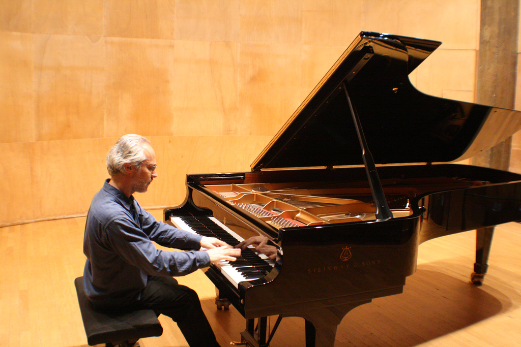 Photo prise par Didier Reboul